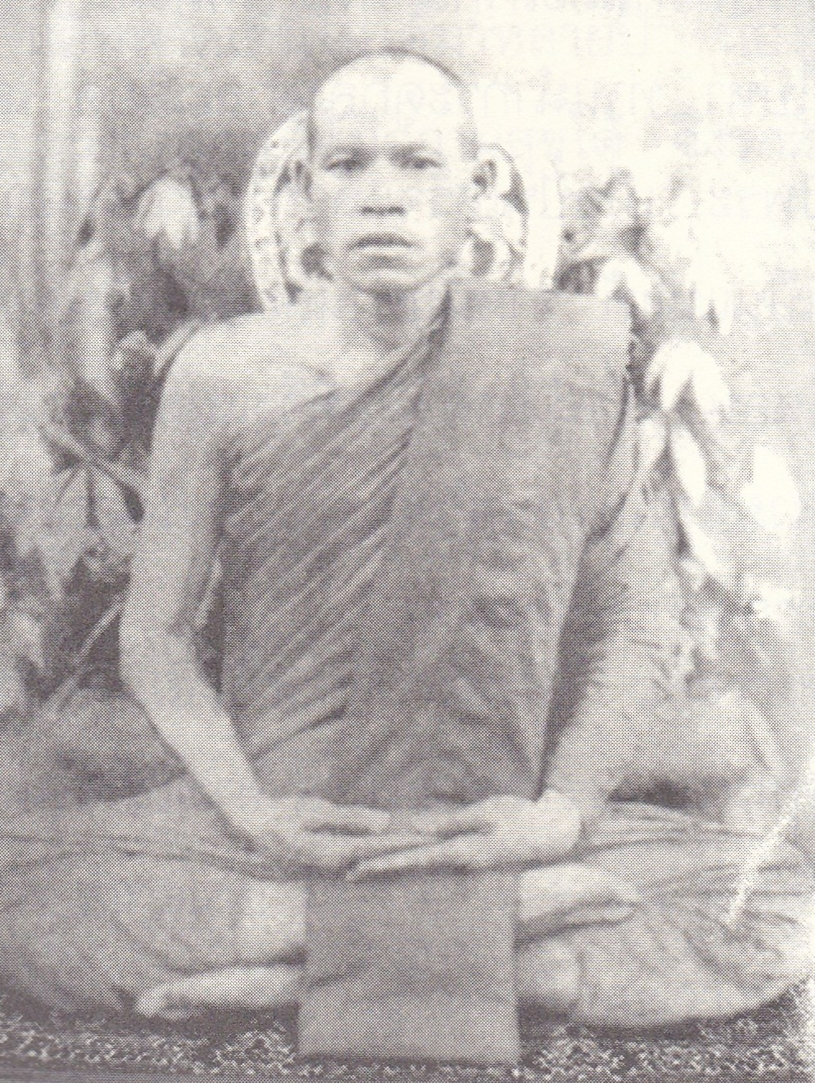 หลวงปู่ดี